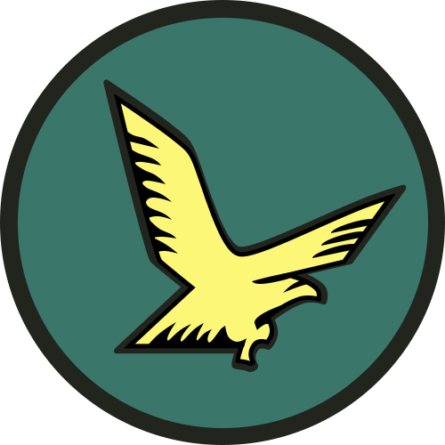 סמל "טייסת 140" ("טייסת נשר הזהב") של חיל האוויר הישראלי..